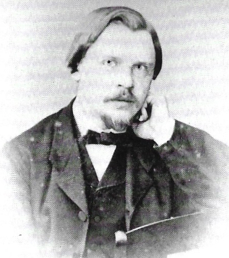 Portret van Karel Johannes Wijlacker (1834-1922)